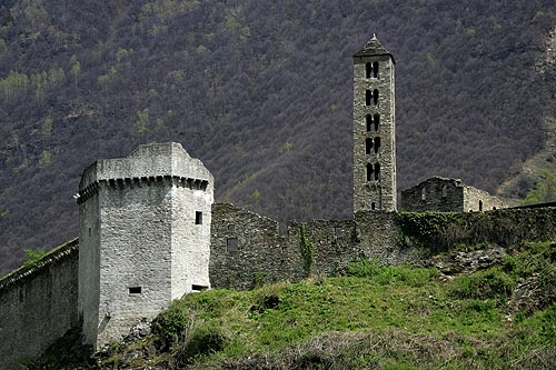 Mesocco: Castello